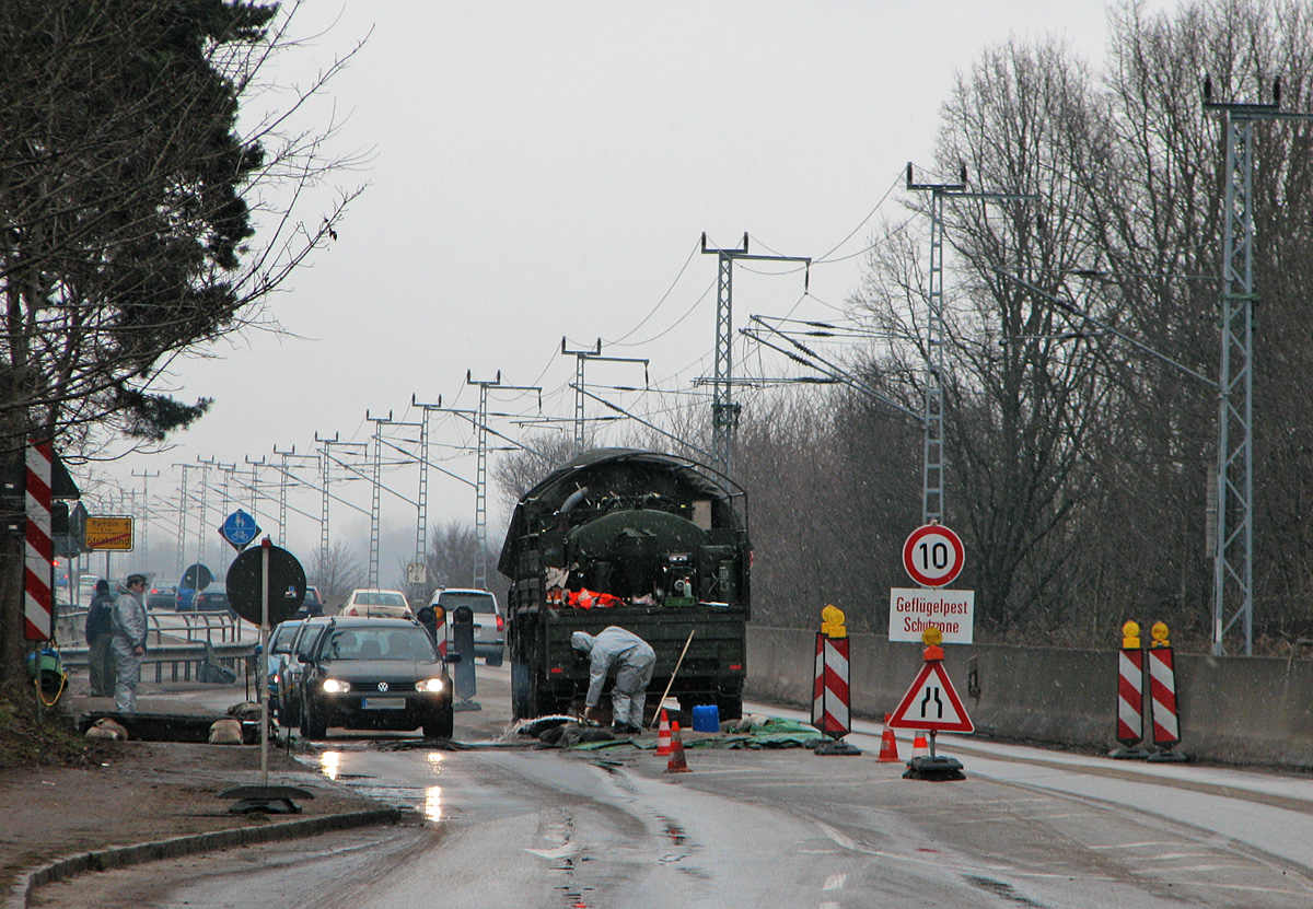 Beschreibung: Desinfektions-Schleuse der Bundeswehr auf dem Dänholm Fotograf: Darkone, 23. Februar 2006